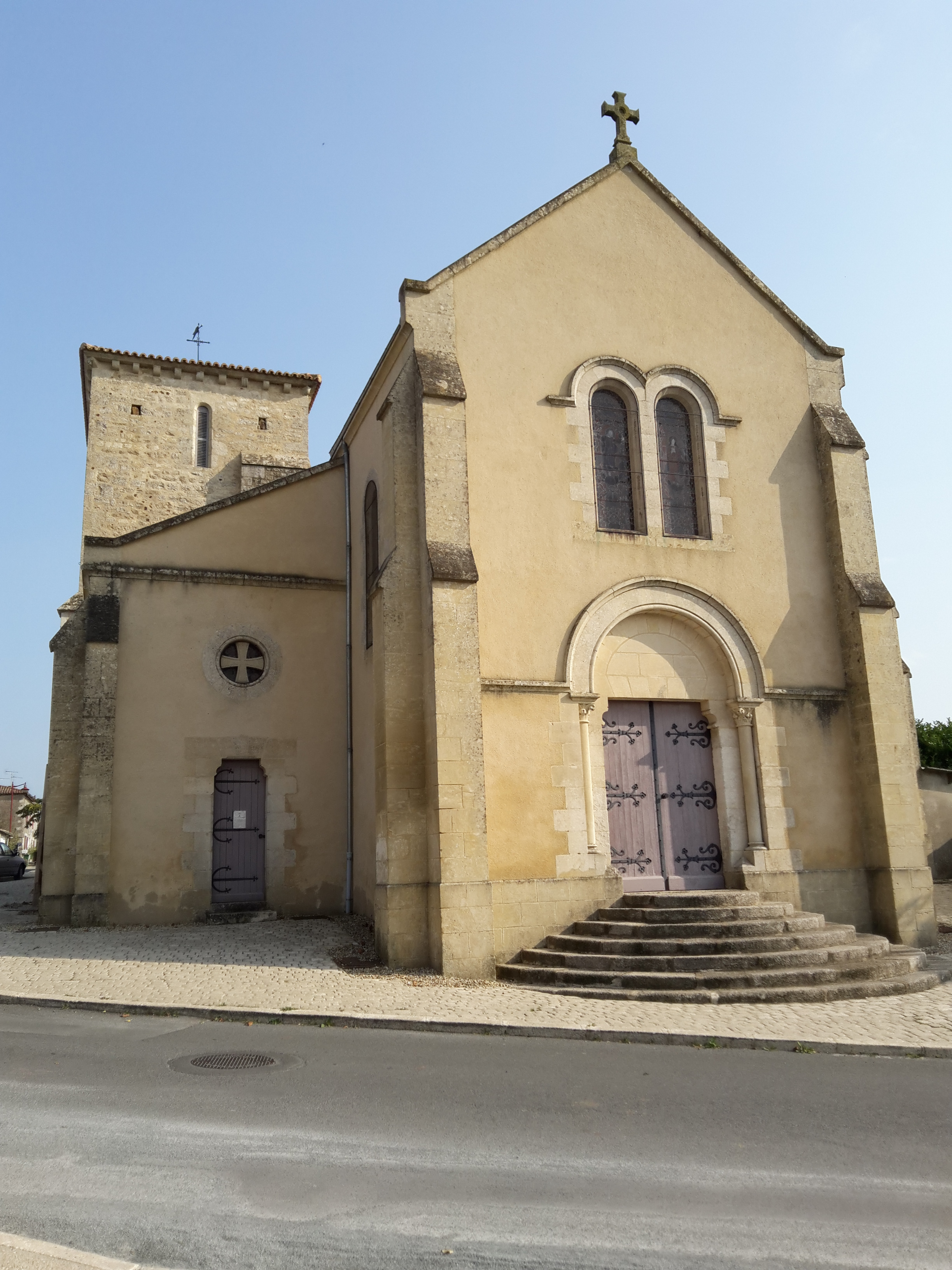 Église de la Chapelle-Thireuil avec son clocher du XIIeme siècle